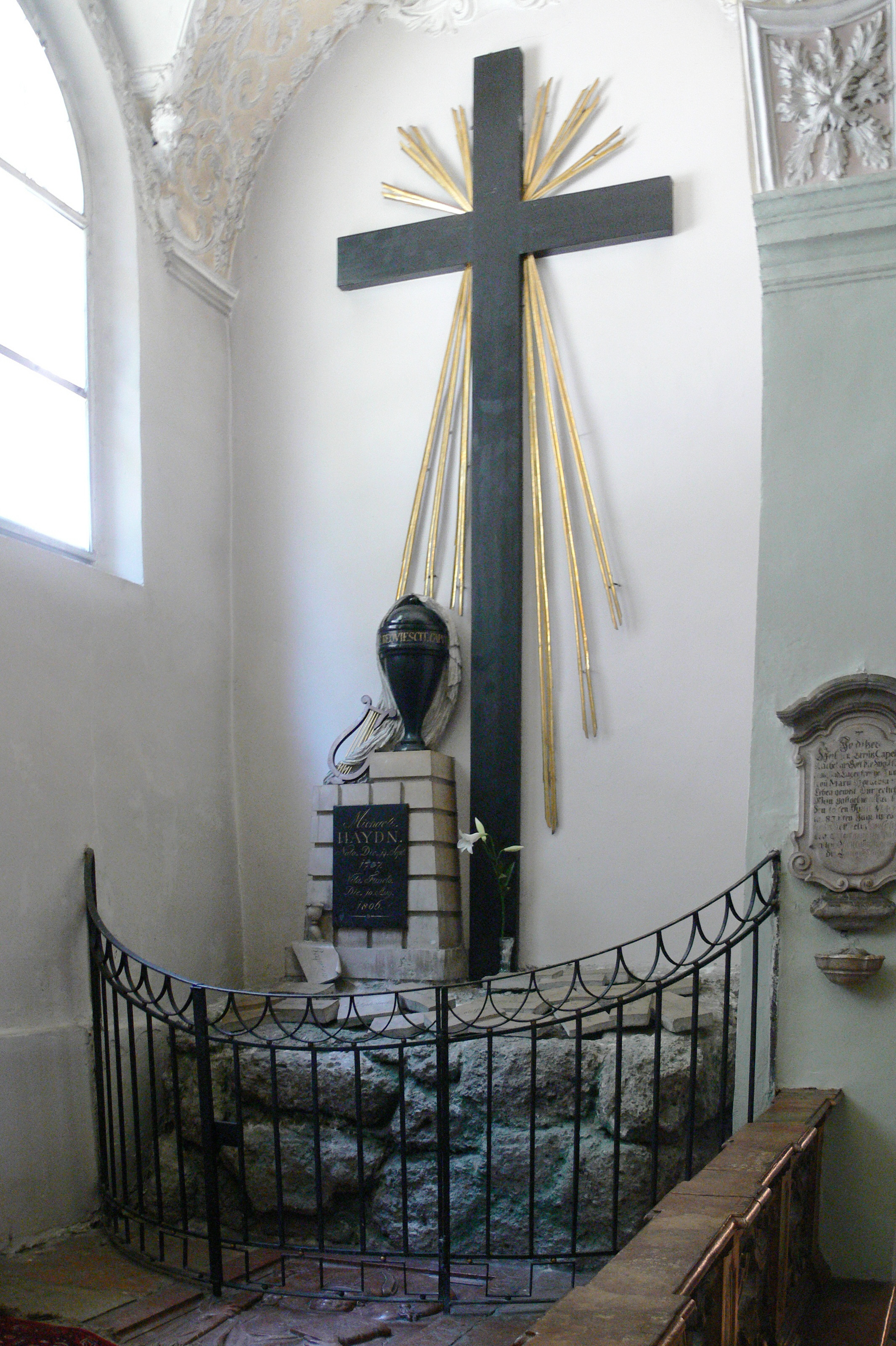 Salzburg, Stiftskirche St. Peter, Epitaph Michael Haydn